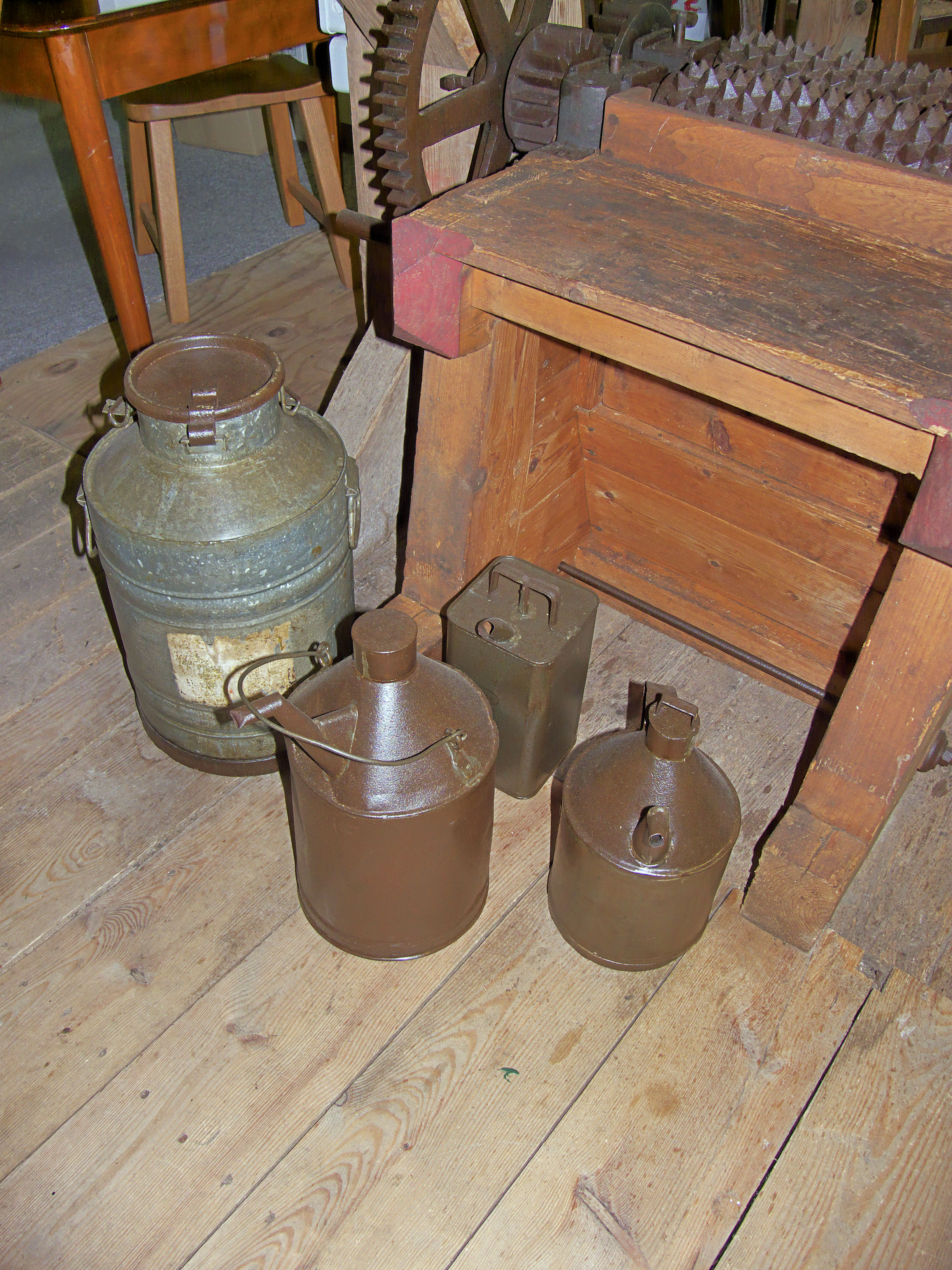 Molen De Liefde, Streefkerk, petroleumkannen met op de achtergrond een lijnkoekenbreker